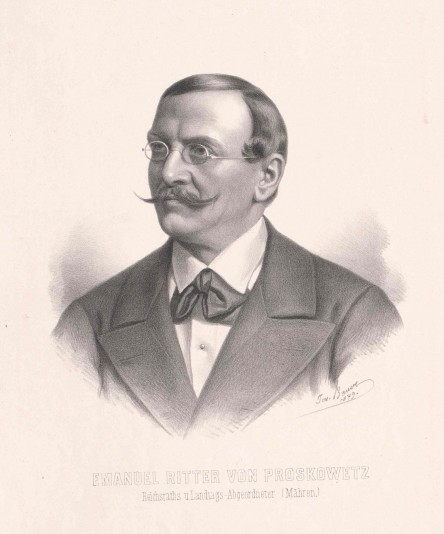 Emanuel von Proskowetz (1818 - 1909), Rakousko-Uherský průmyslník, podnikatel a politik.